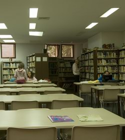 Interior de la Biblioteca Municipal de Jaraíz de la Vera